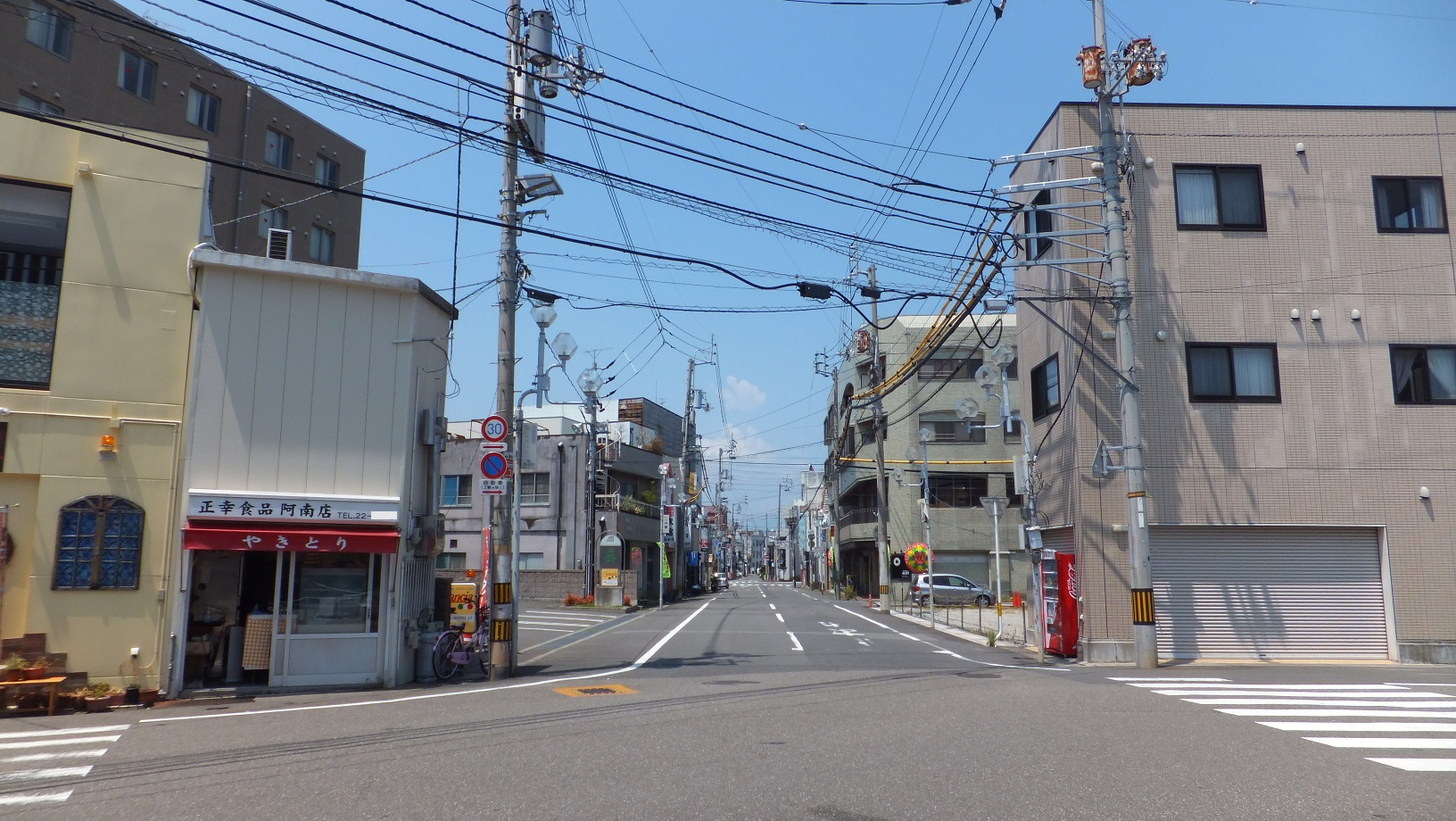 徳島県阿南市の阿南駅前